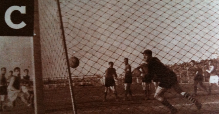 Toma Maglie-Venezia 1-0 del 18/01/1953. Il gol di Giusti per i padroni di casa.